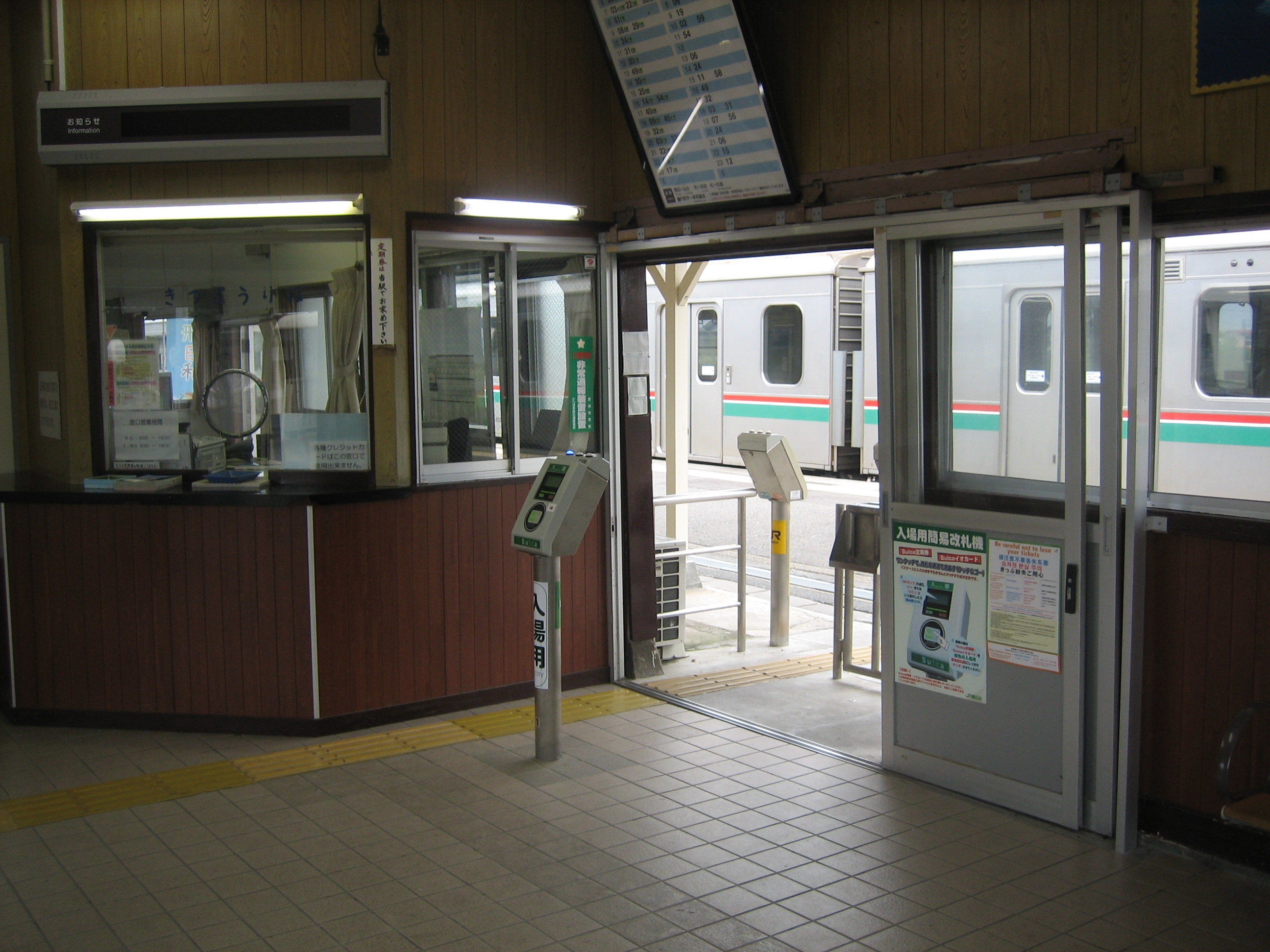 JR常磐線浜吉田駅構内の改札口